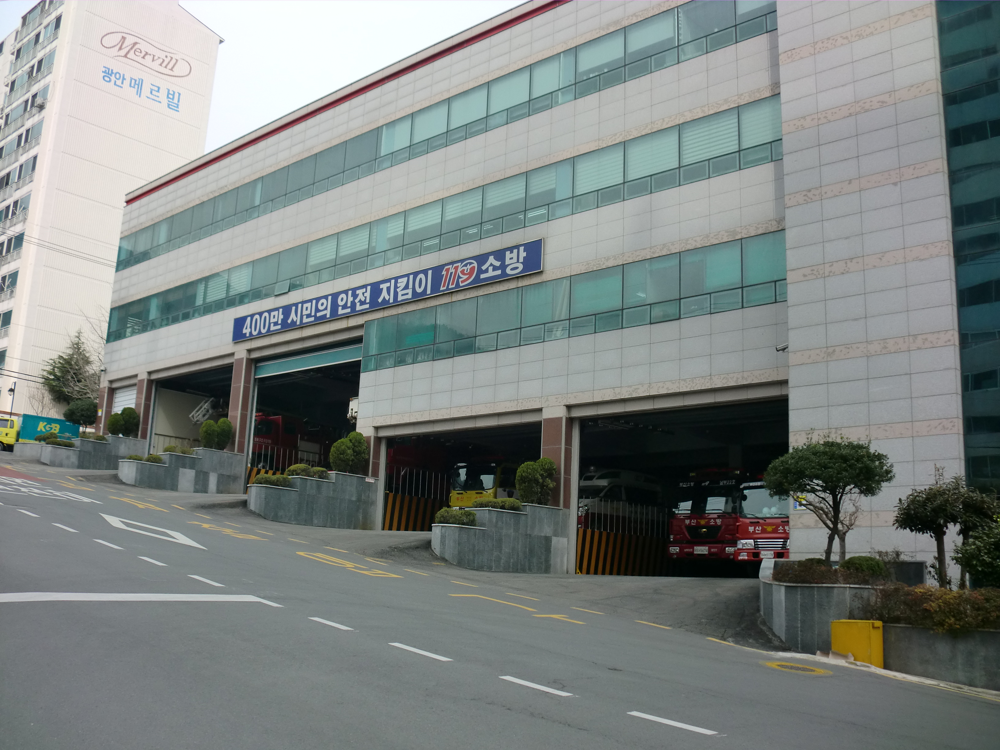 부산광역시 수영구에 있는 남부소방서